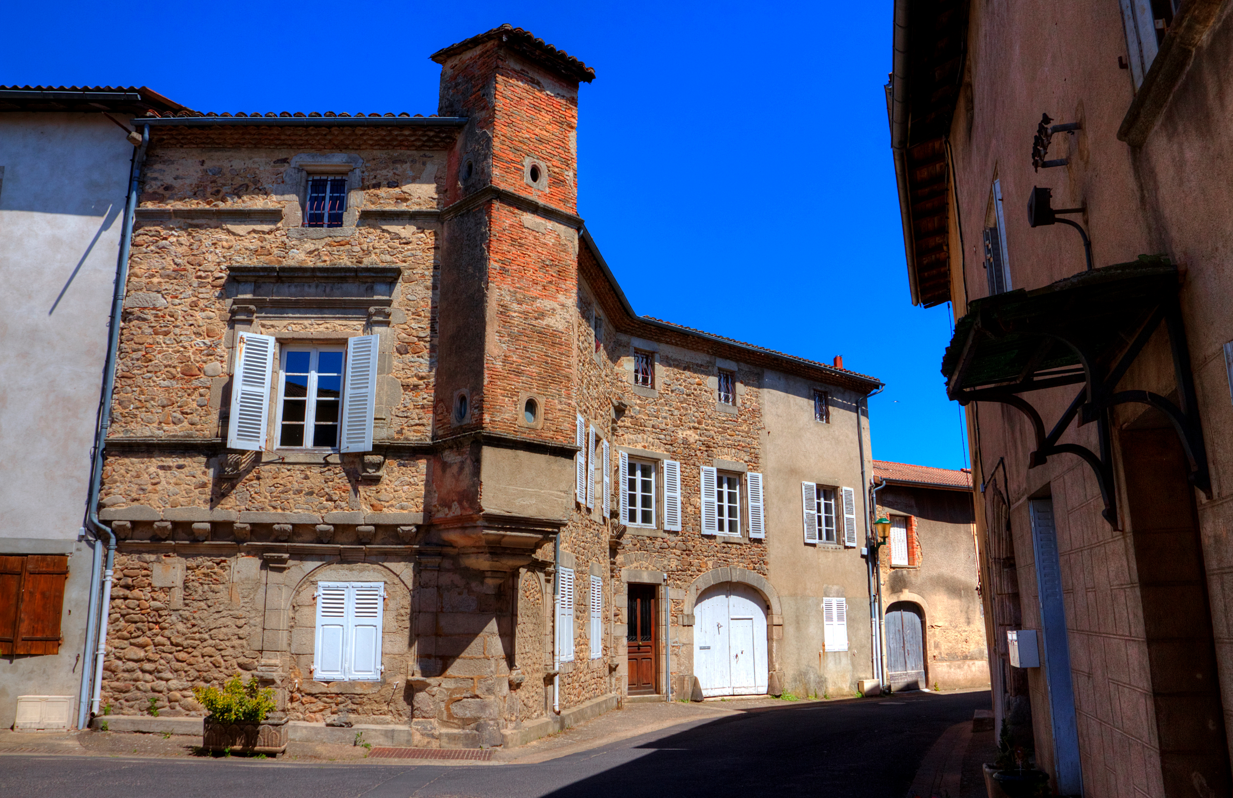 Maison avec tourelle d'angle, XVIème siècle, Vollore Ville